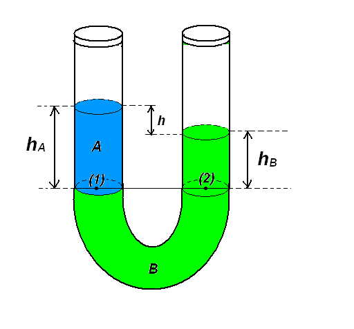 Trata-se de uma representação de Vasos Comunicantes com formato de U.Lucimara,Altimare,Eduardo.